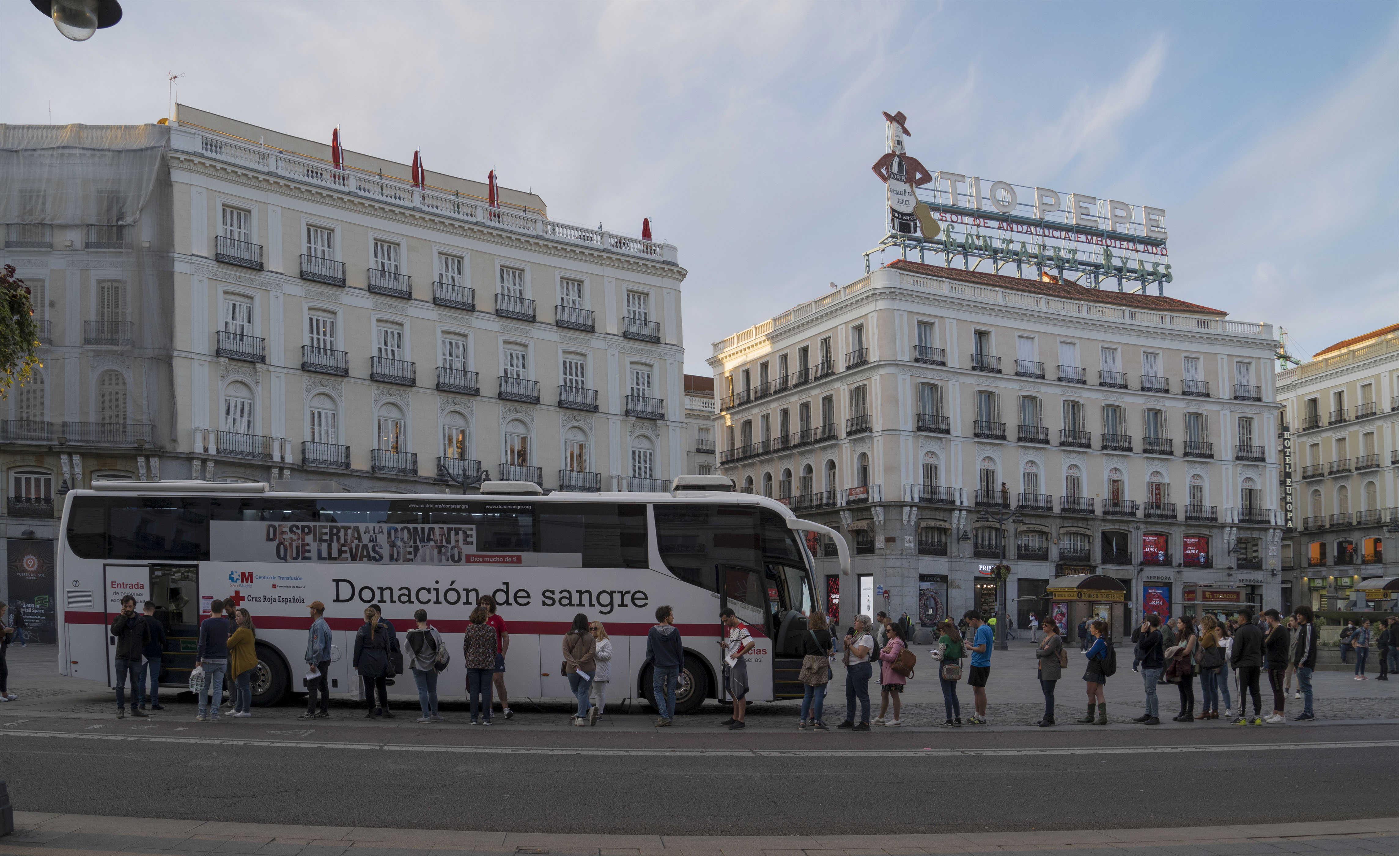 Marzo de 2020. Cola de donantes en la Puerta del Sol conocido que podría necesitarse sangre.